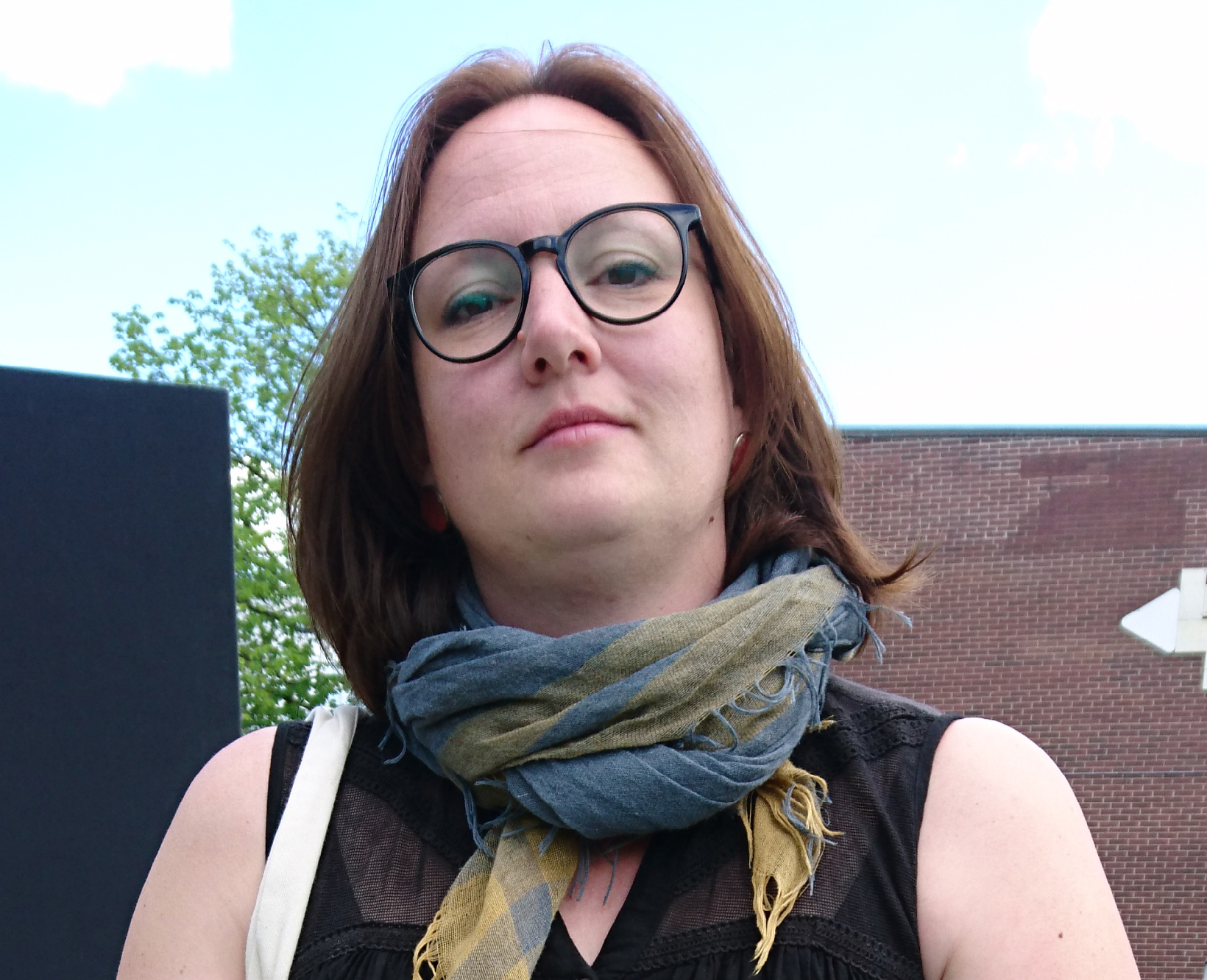 Jessica Schiefauer i Positivparken i Västra Frölunda, nedanför Frölunda Kulturhus.